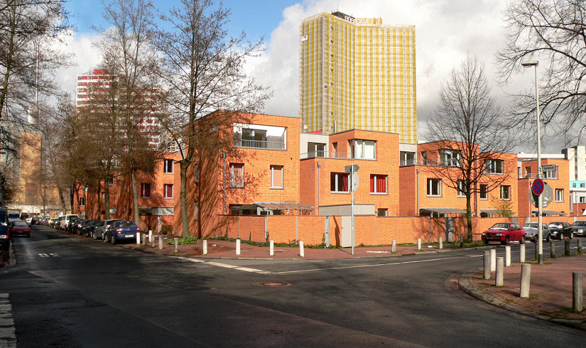 Reihenhäuser auf Gelände frühere Lindener Brauerei in Hannover